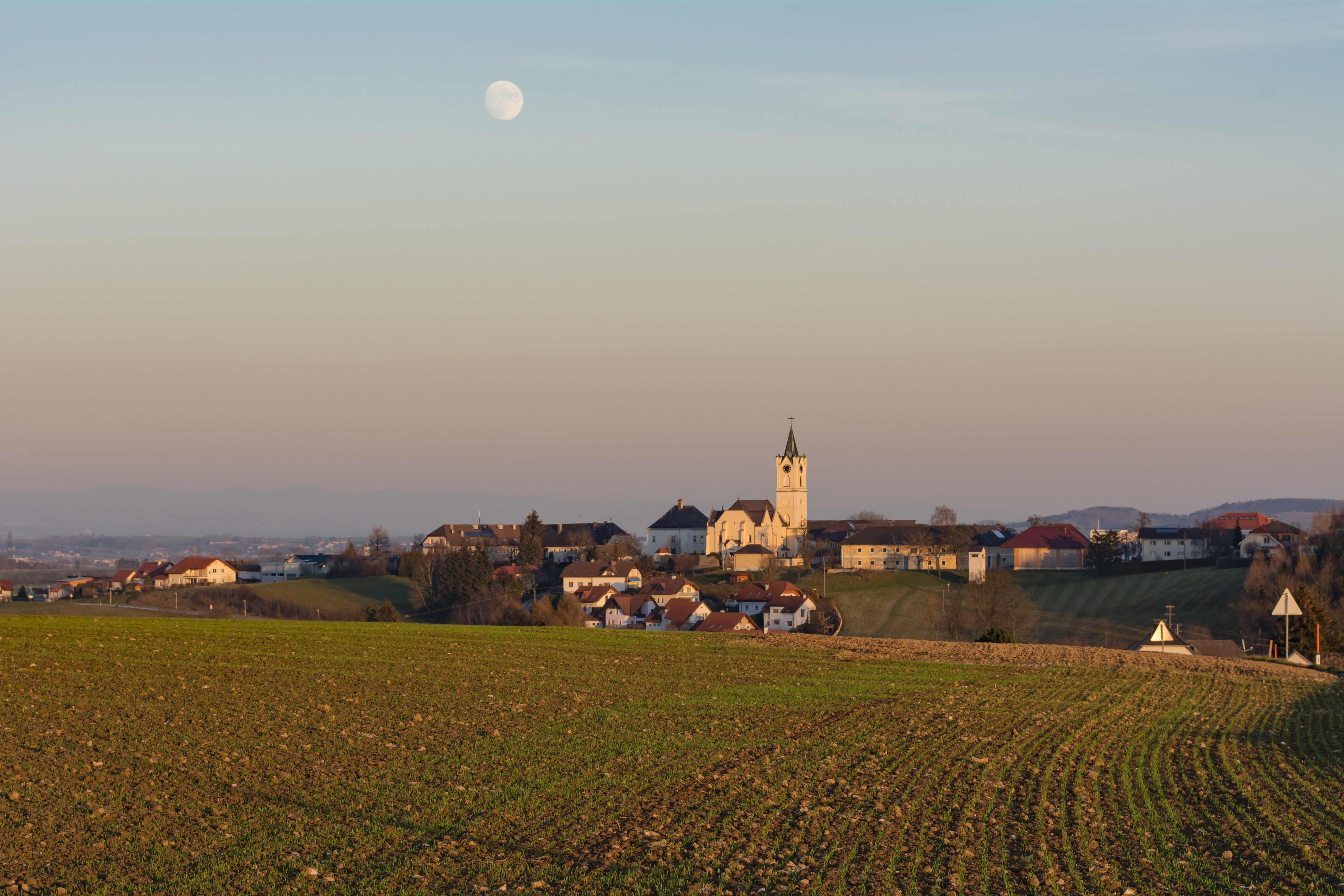 Hargelsberg ist eine Gemeinde im Bezirk Linz-Land (Oberösterreich). In der Gemeinde befinden sich mehrere denkmalgeschützte Objekte, darunter die Kath. Pfarrkirche hl. Andreas und der Pfarrhof.